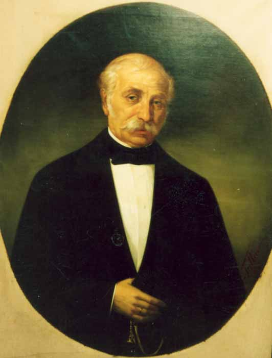 Gheorghe Tattarescu - Portretul lui Lazăr Calinderu - Muzeul Municipiului Bucureşti